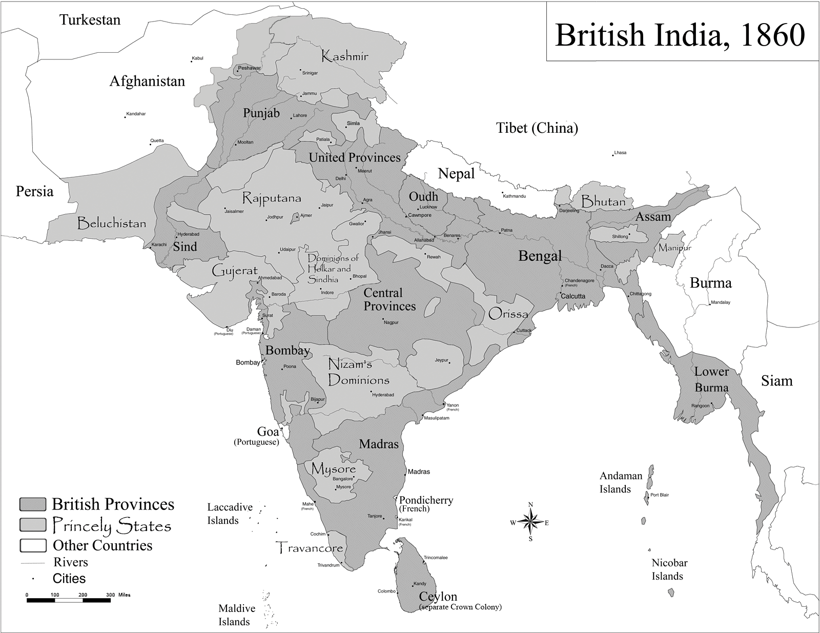 British Raj